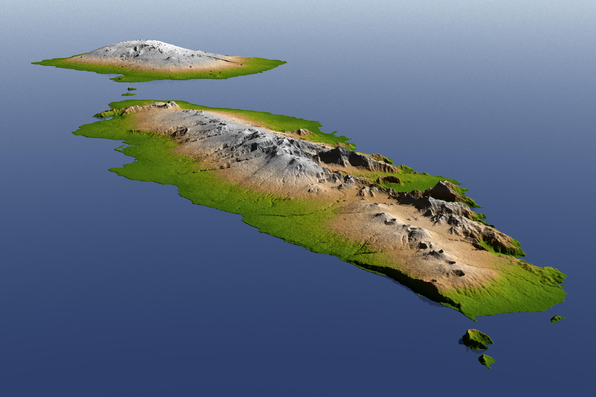 Profil des Staates Samoa. Perspektive in Richtung Nordwest vom Punkt 14 Grad süd / 172 Grad West aus.